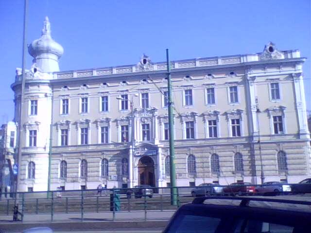 Palatul Administrației Financiare (Trezoreria)